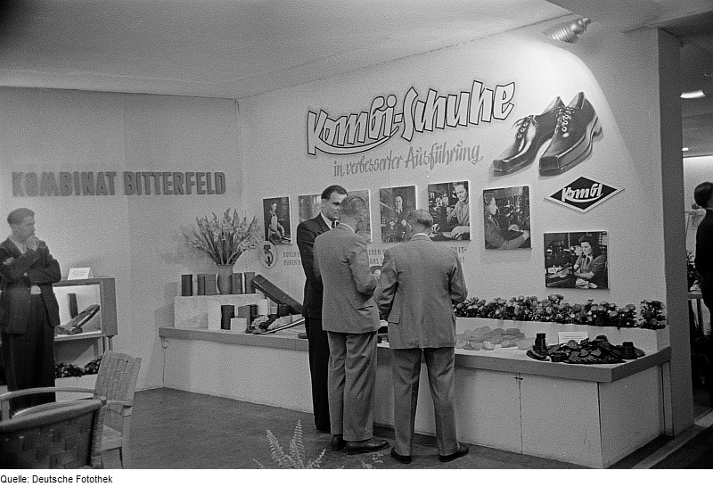 Original image description from the Deutsche Fotothek Fachbesucher vor dem Messestand mit Kombi-Schuhen des Kombinats Bitterfeld